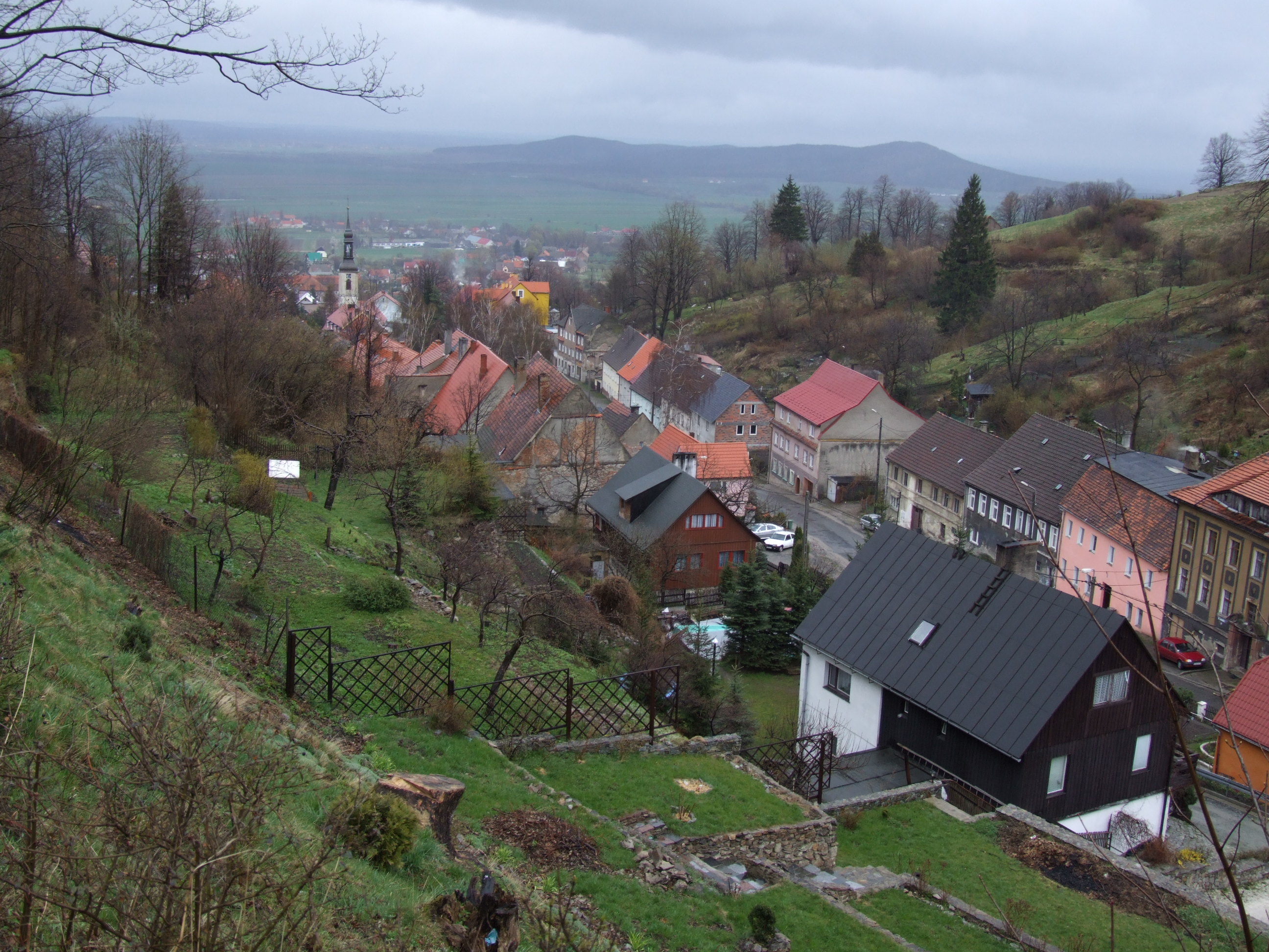 Village Silberberg (Srebrna Góra) in Sudetes